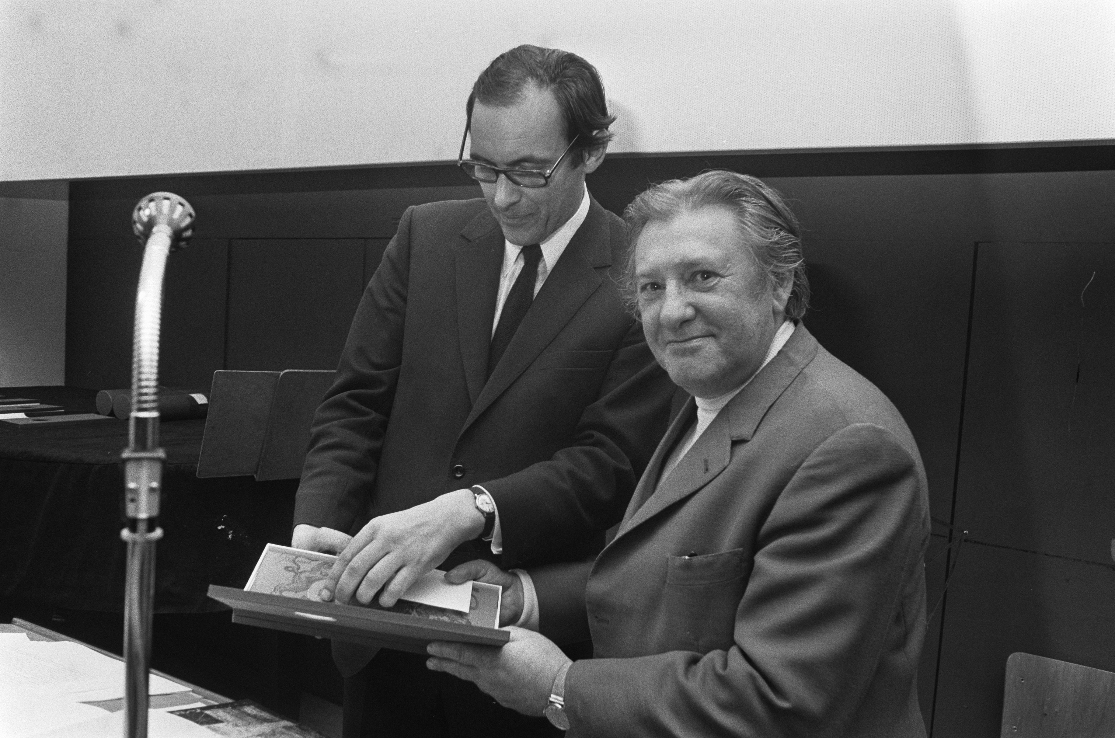 Wethouder Han Lammers reikt Multatuliprijs uit aan Louis Paul Boon, 9 maart 1973.